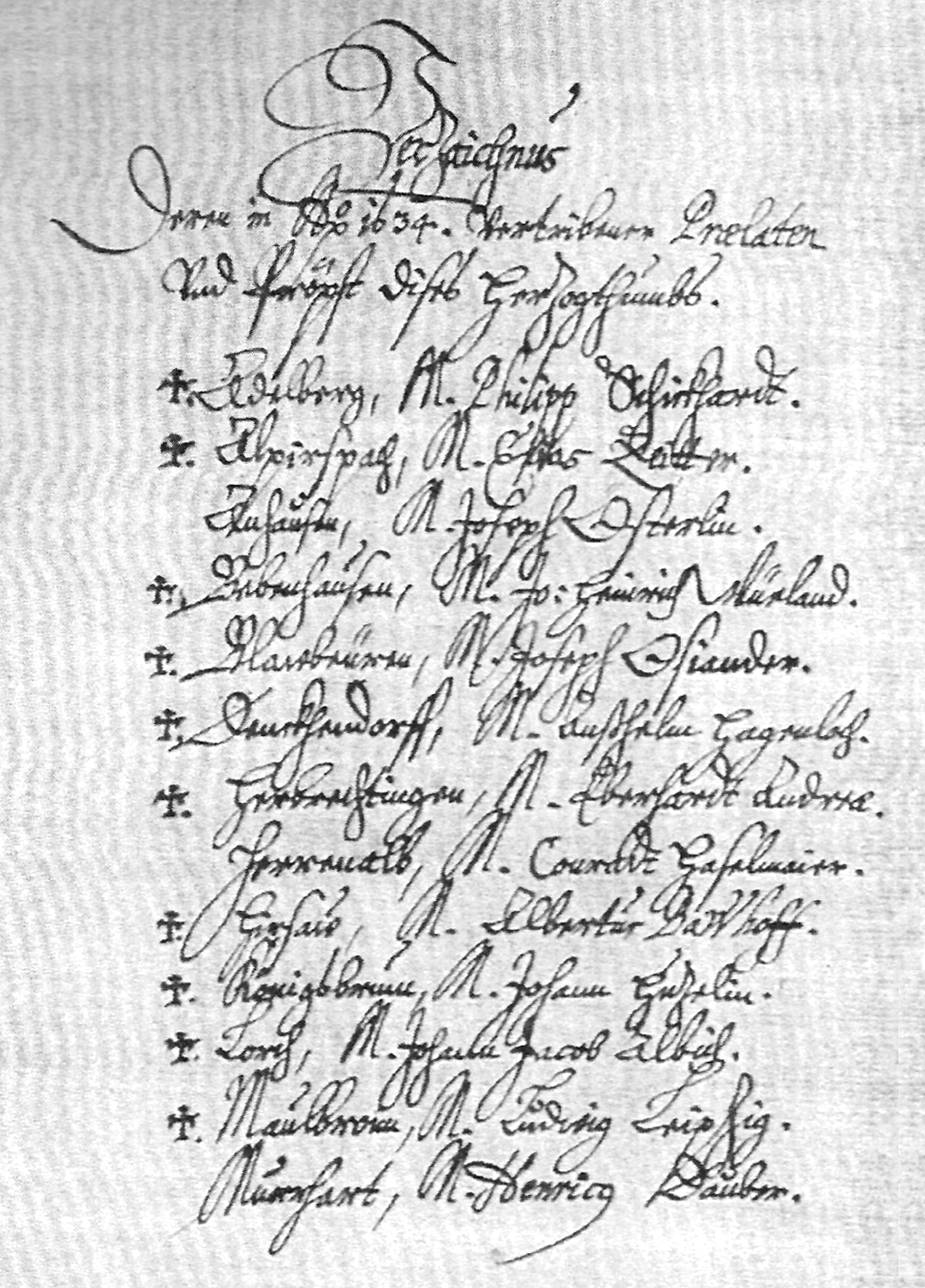 Verzeichnis der im Jahre 1634 vertriebenen evangelischen Prälaten. Anlage zu einem Bericht des evangelischen Kirchenrats von Württemberg vom 18. Juni 1641. – An erster Stelle ist Philipp Schickhart genannt.